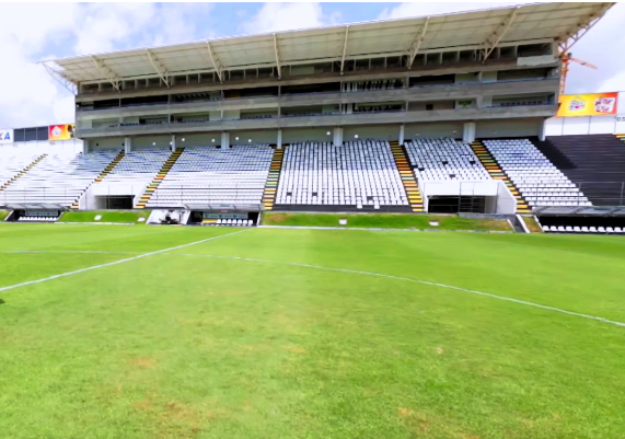 Estádio Frasqueirão em Natal, Rio Grande do Norte, Brasil.